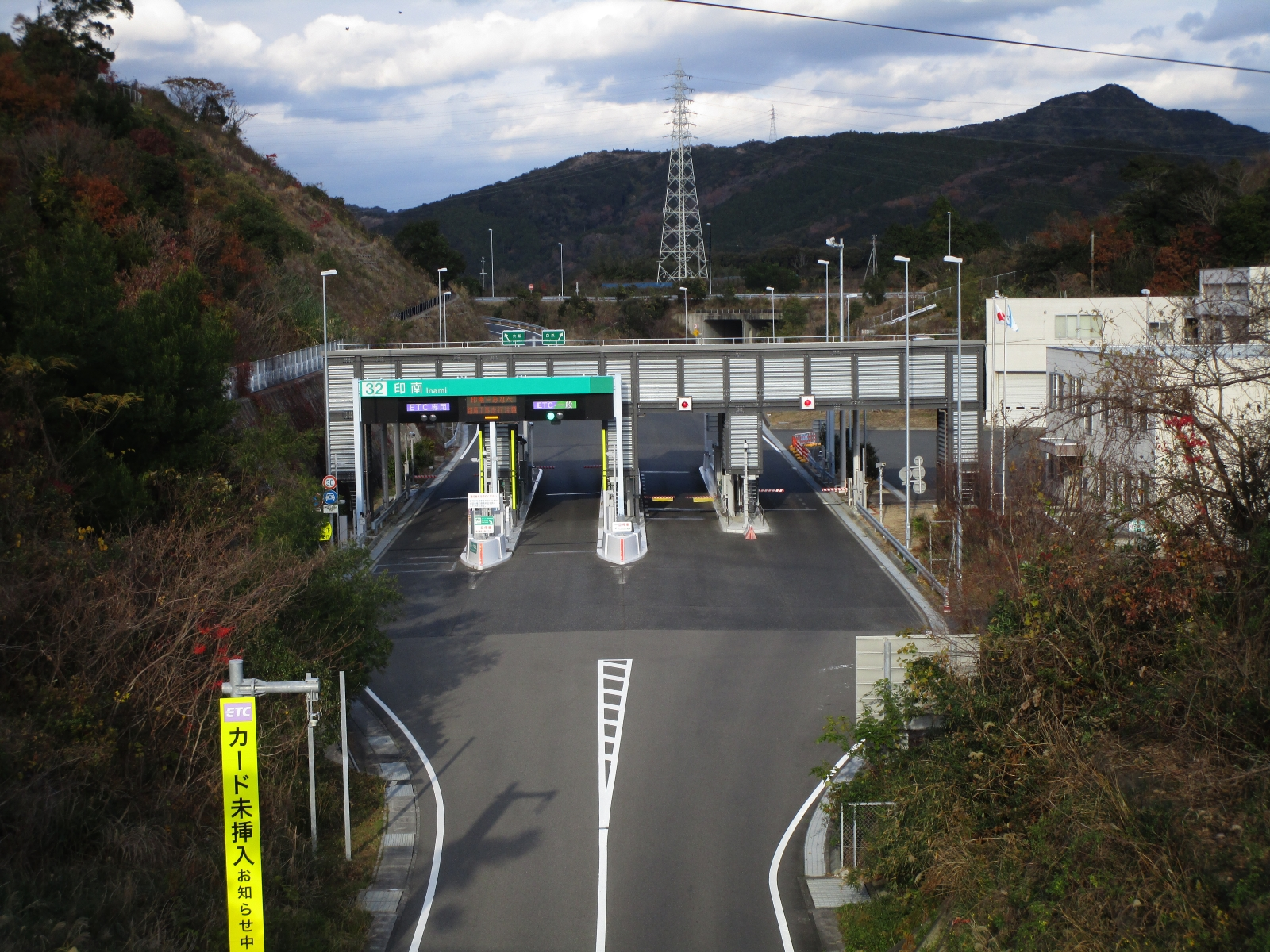 印南インターチェンジ料金所